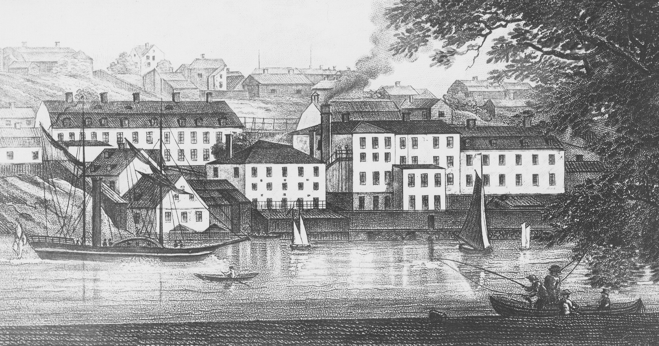 Öbergska klädesfabriken (nuv. kvarteret Spännramen)